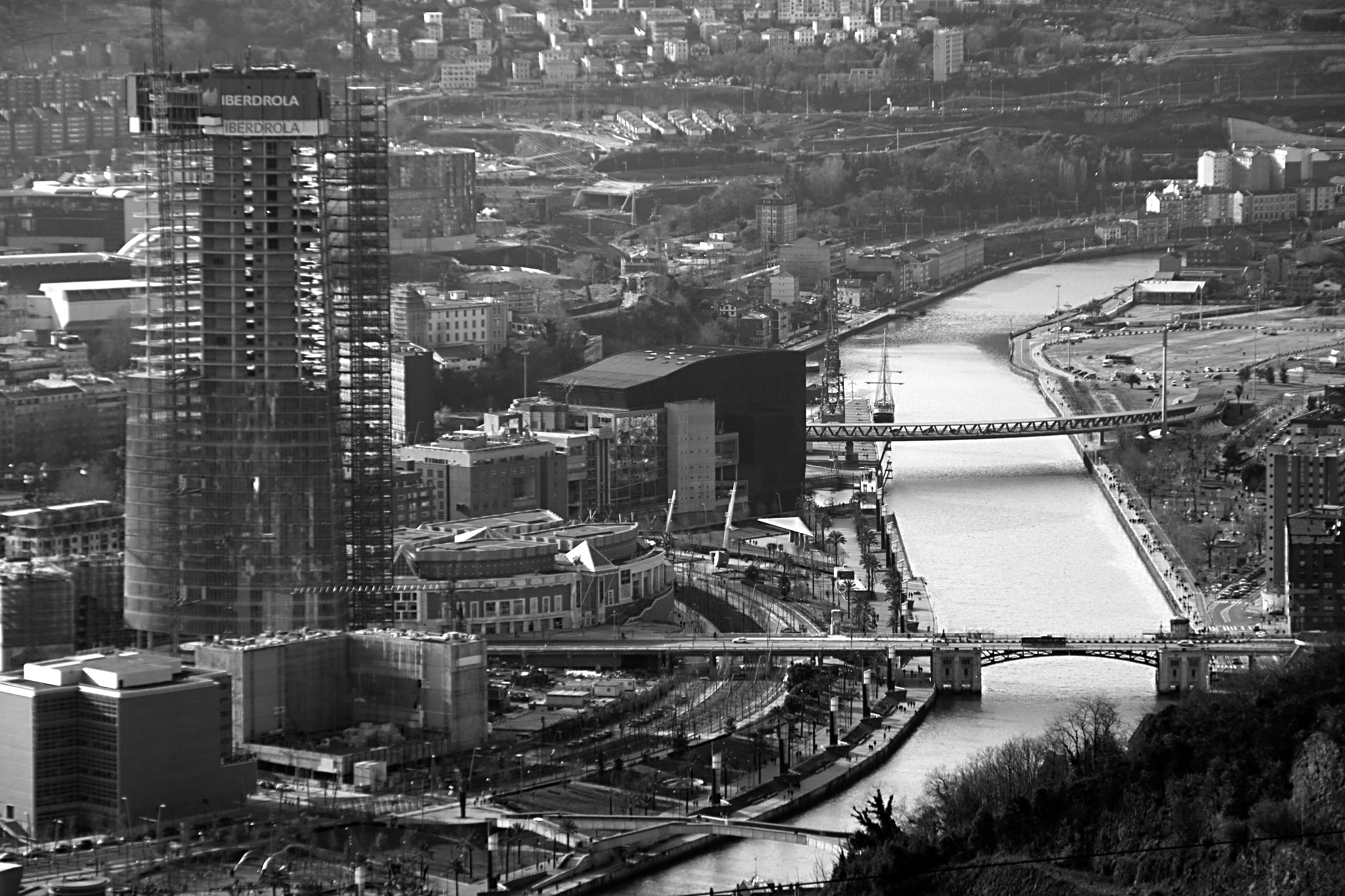 Abandoibarraren ikuspegia, goitik, 2010eko otsailean.